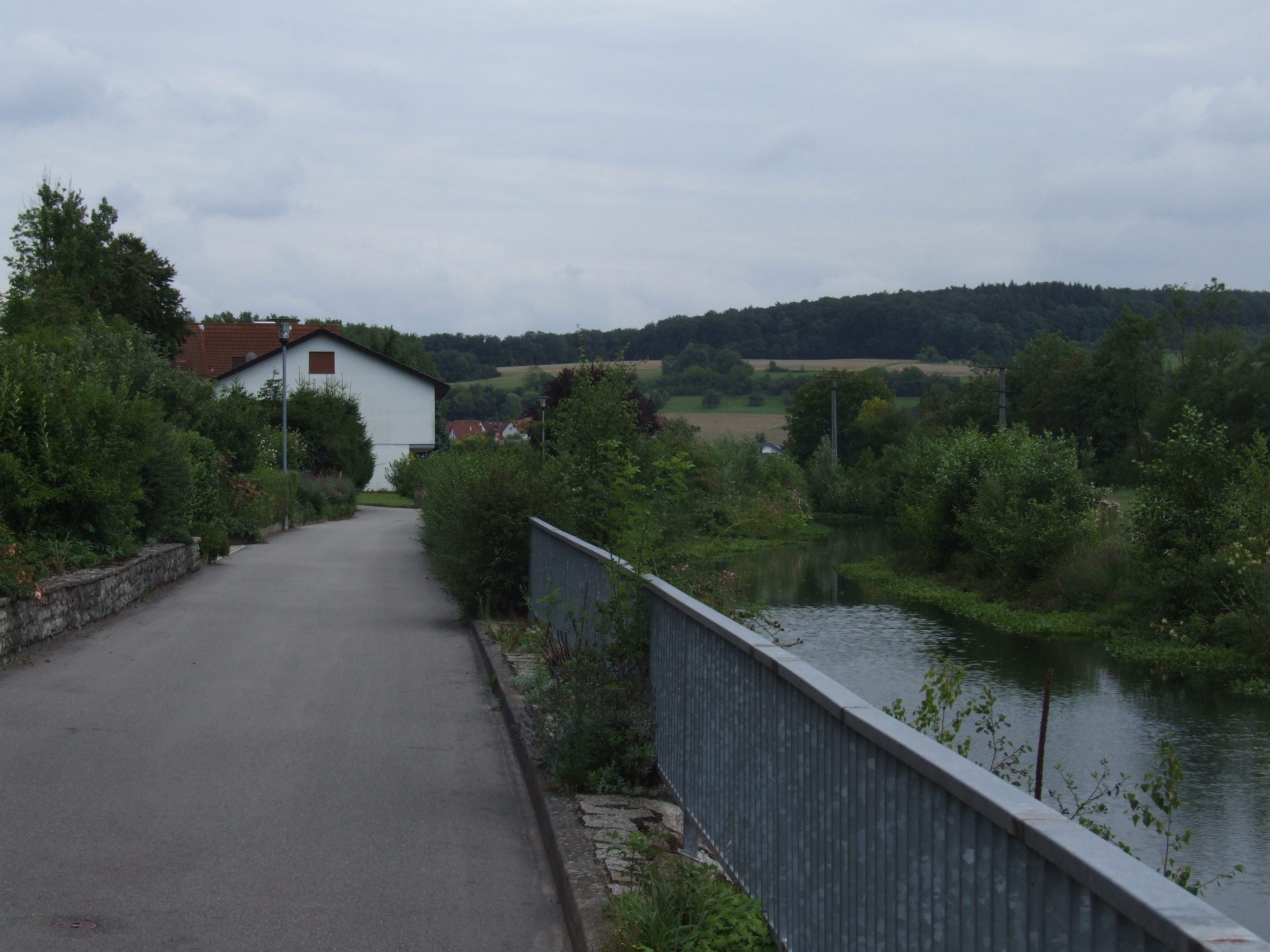 Mühlweg in Eschelbronn